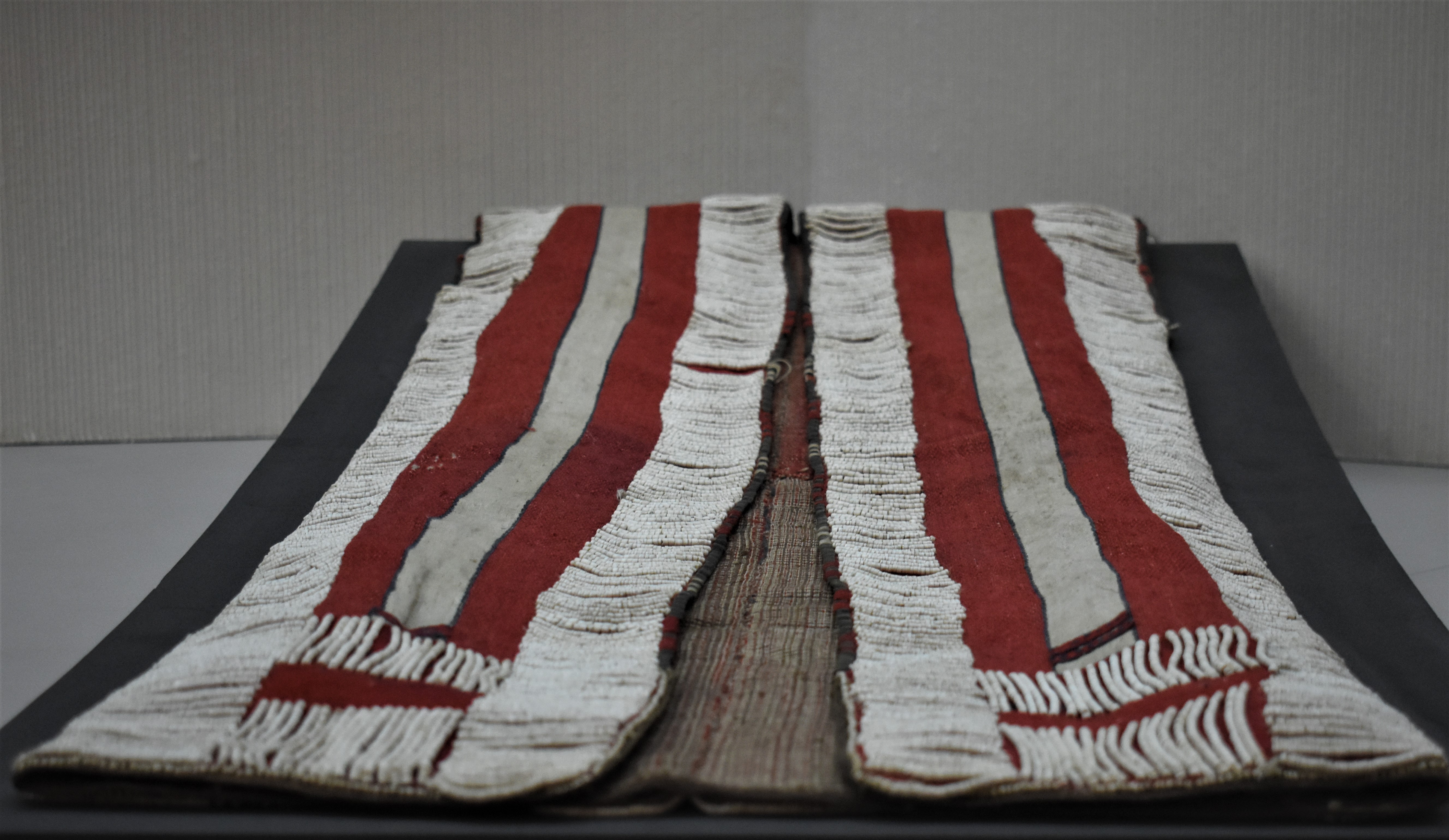 中文（台灣）: 臺北市立文獻館收藏的泰雅族貝珠衣